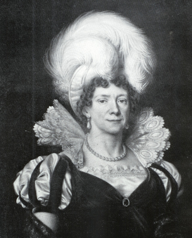 Portret van prinses Louise van oranje-nassau (overleden 1819).